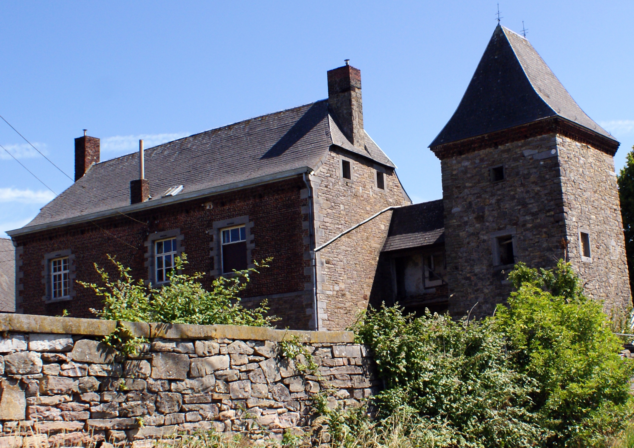 Chateau-ferme de Wartet, détail du corps de logis et de la tour médiévale (donjon), Bayet